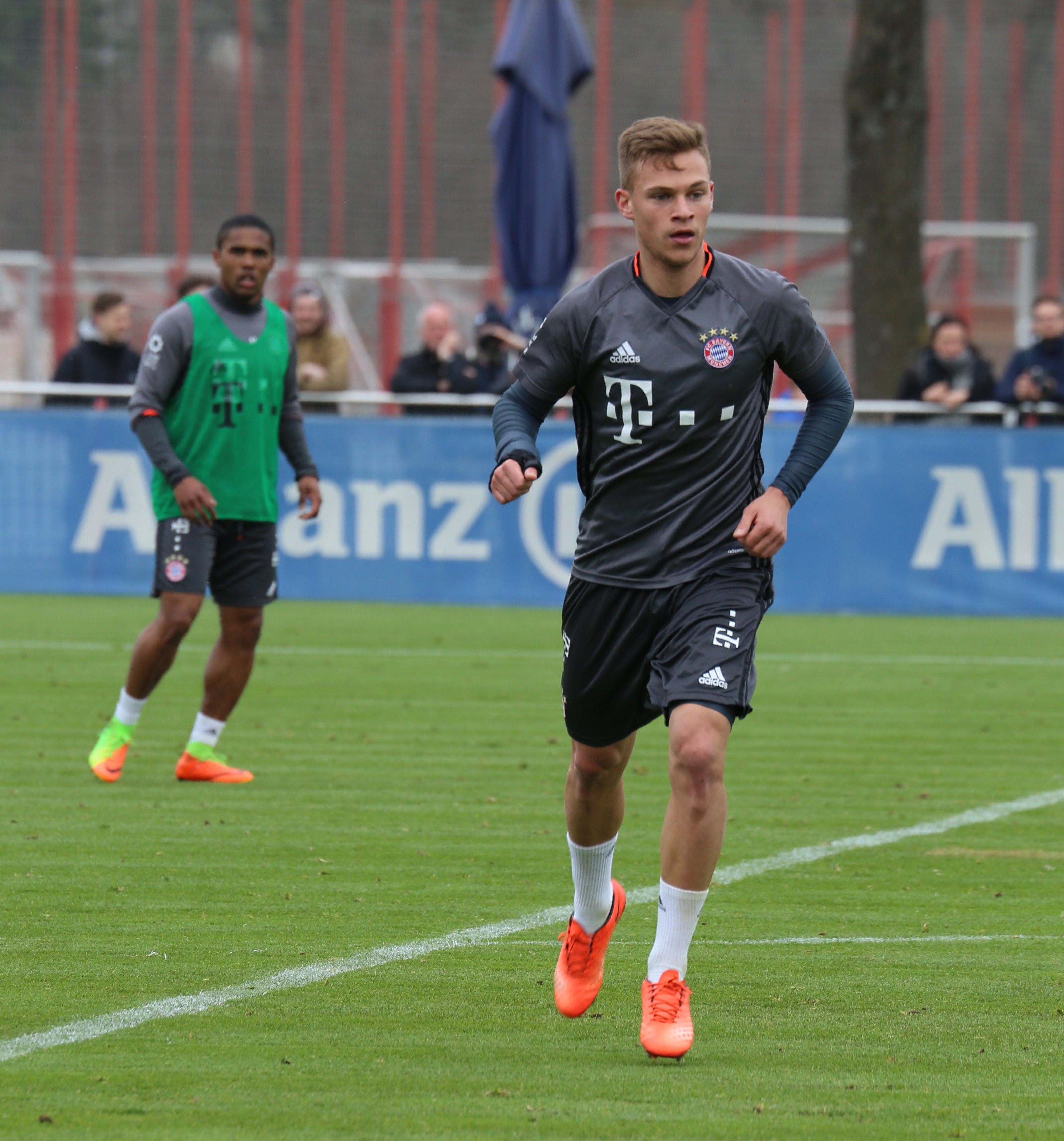 Joshua Kimmich am 14. März 2017 beim Training auf dem Gelände des FC Bayern München